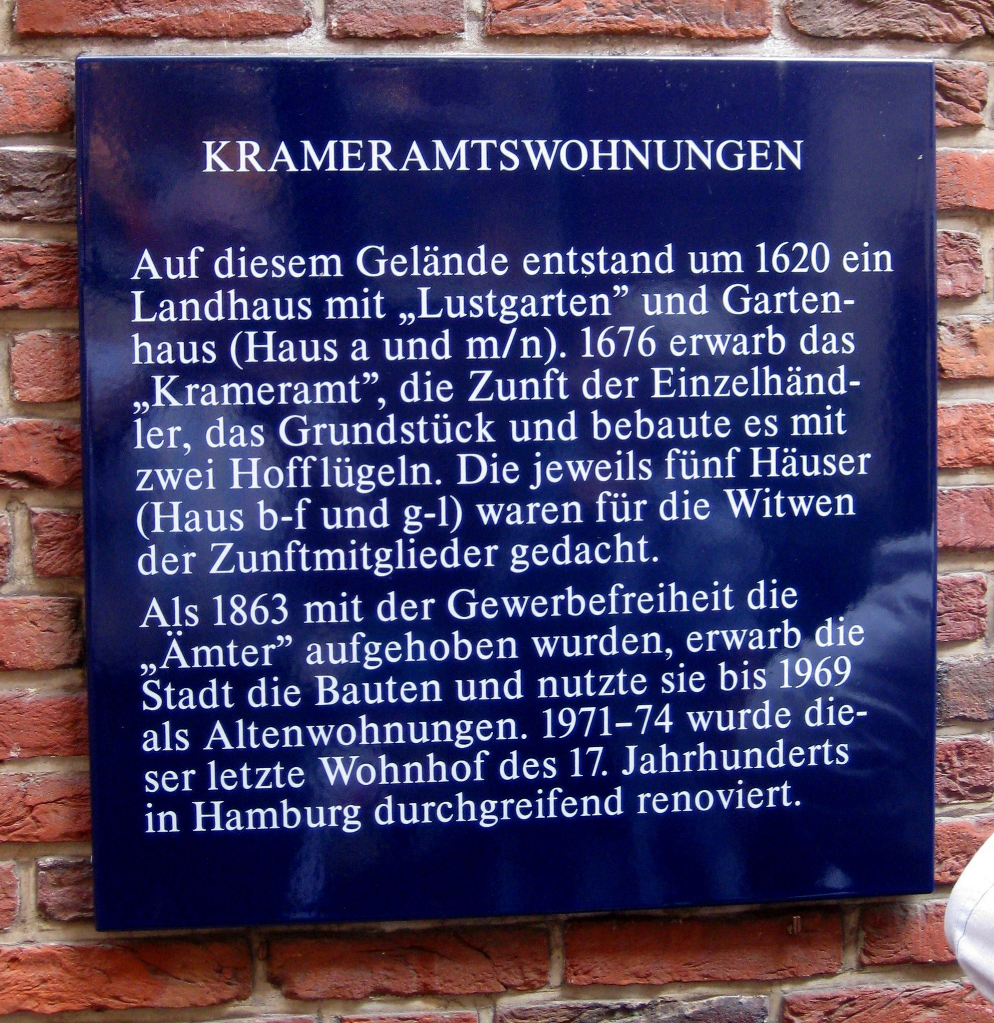 Krameramtswohnungen / Erläuterungstafel This is a photograph of an architectural monument.